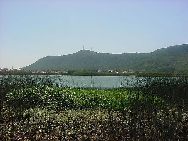 Morro de Osório